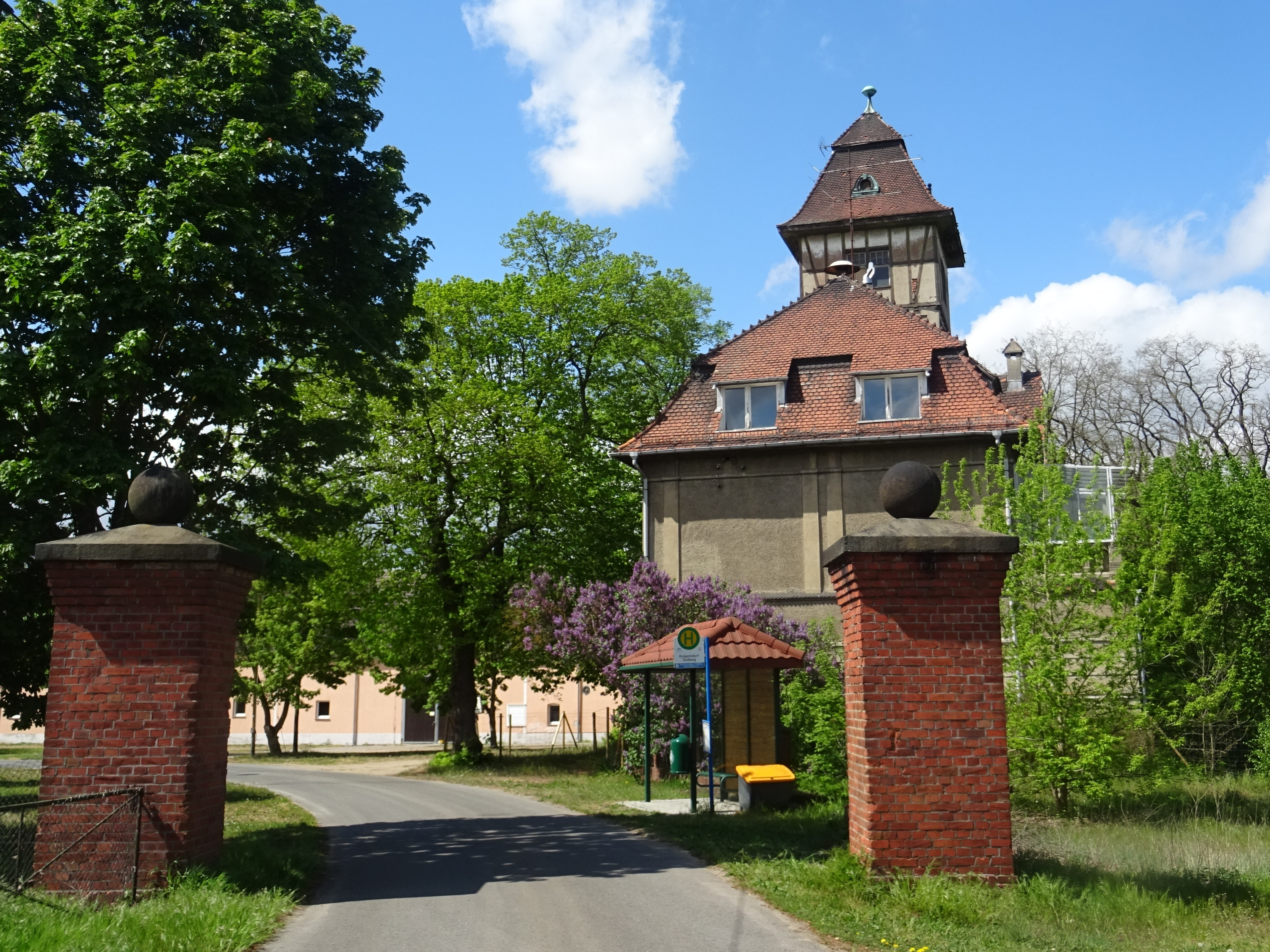 Knippelsdorf-Siedlung, Gutshaus mit östlicher Einfahrt